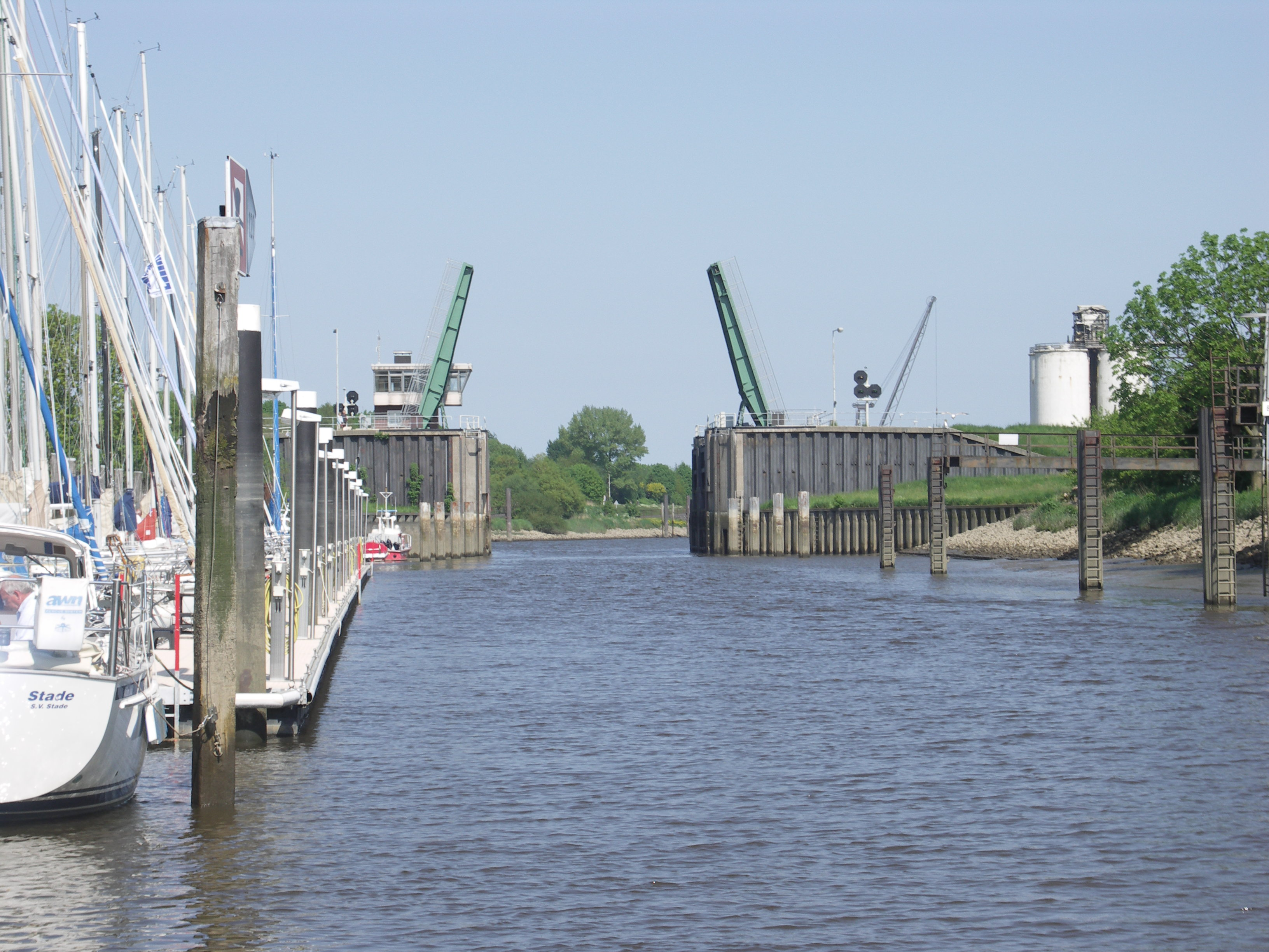 Schwingesperrwerk bei Ebbe; Blick flussabwärts